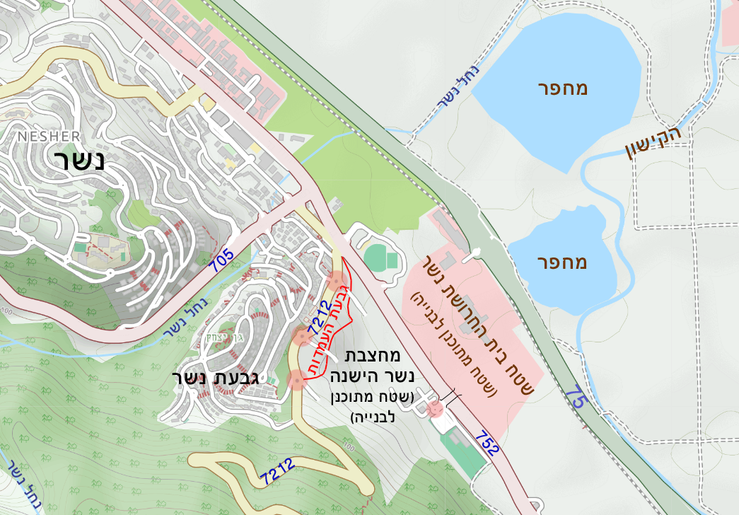 מפה סכמטית של תוכנית הבנייה של כלל תעשיות בנשר